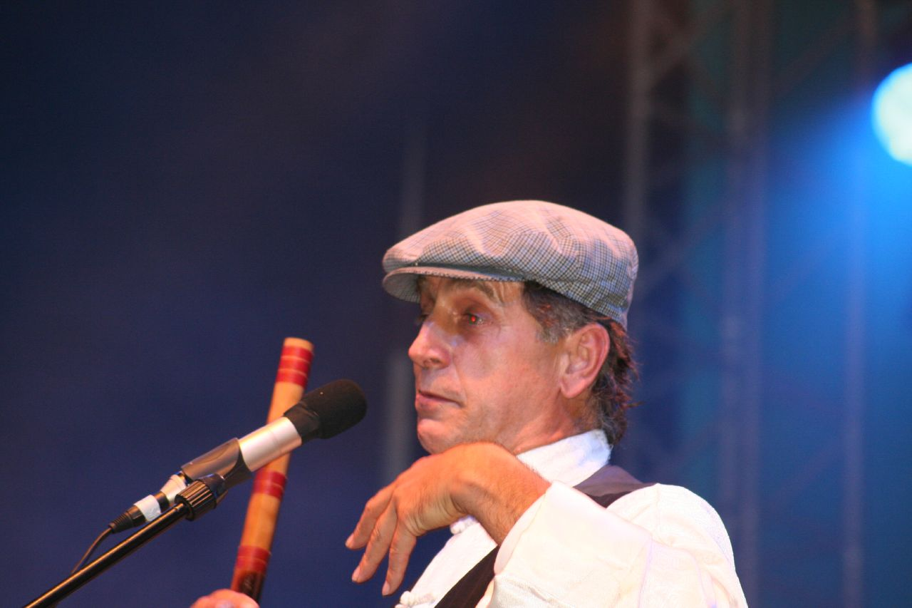 Rão Ryão at FMM Festival das Musicas do Mundo em Sines 2007